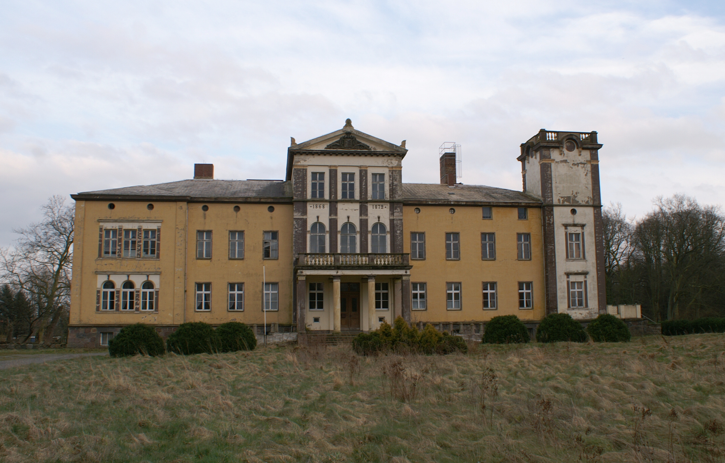 Gültz, Landkreis Demmin, Herrenhaus, Westseite